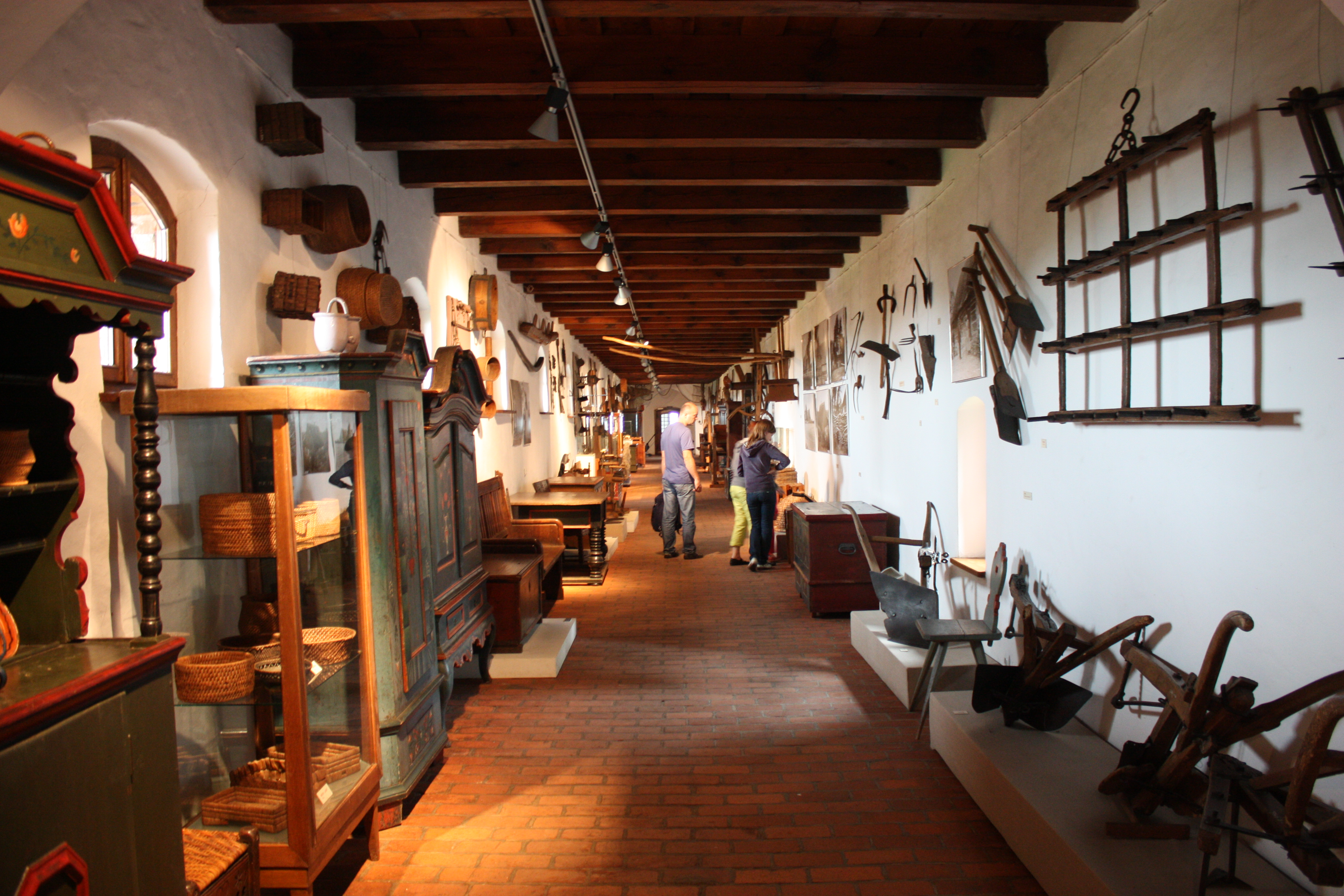 Kwidzyn, Zamek Kapituły Pomezańskiej, ob. muzeum, ok. 1322-XIX